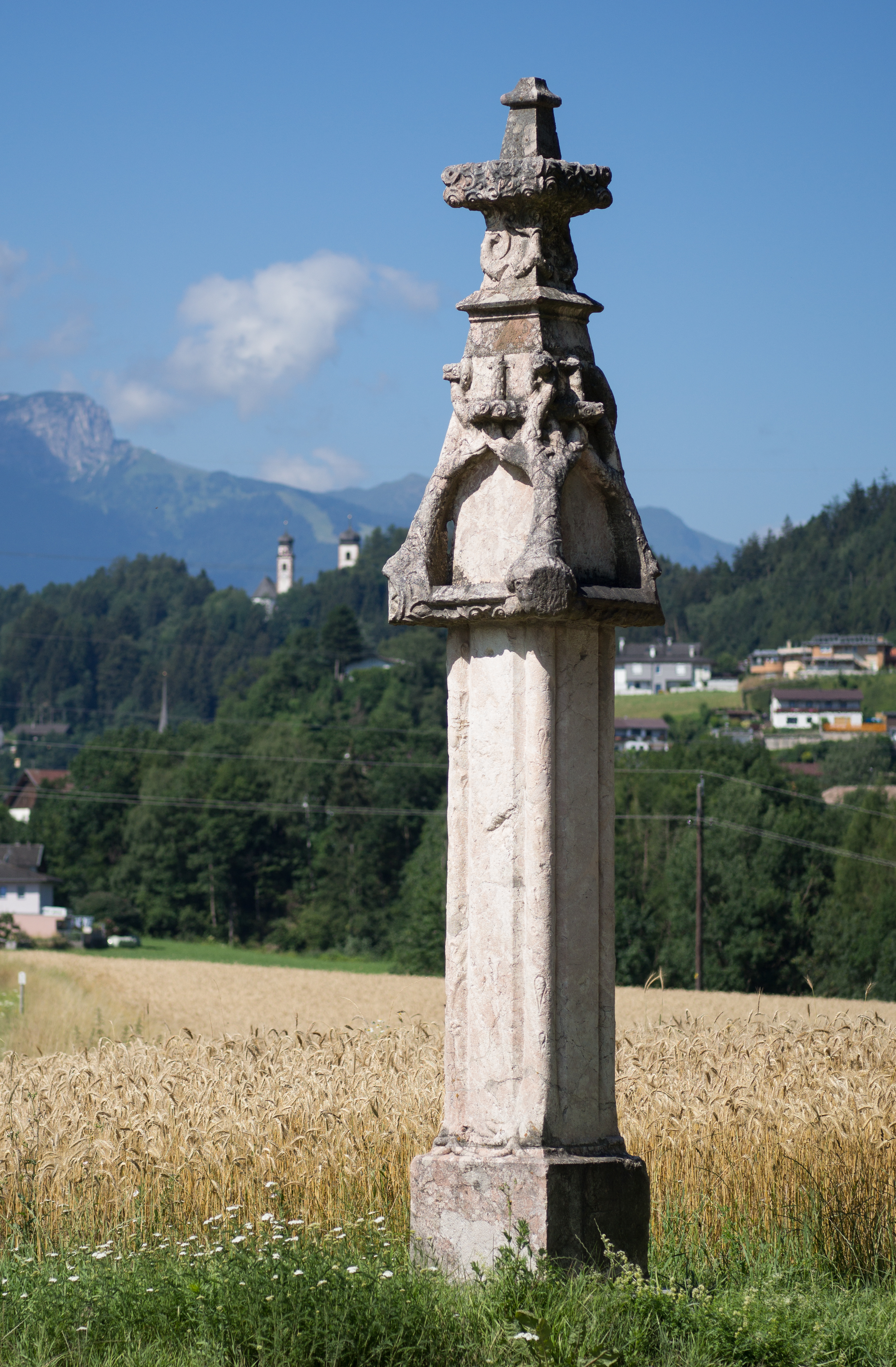 die Viertelsäule bei Ampass This media shows the remarkable cultural object in the Austrian state of Tyrol listed by the Tyrolean Art Cadastre with the ID 51078.